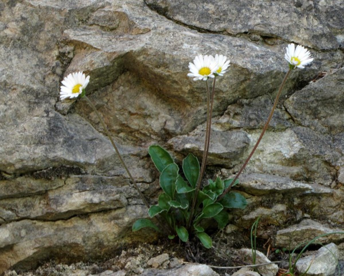 Marjetičastolistna nebina na ljubeljskem prelazu.